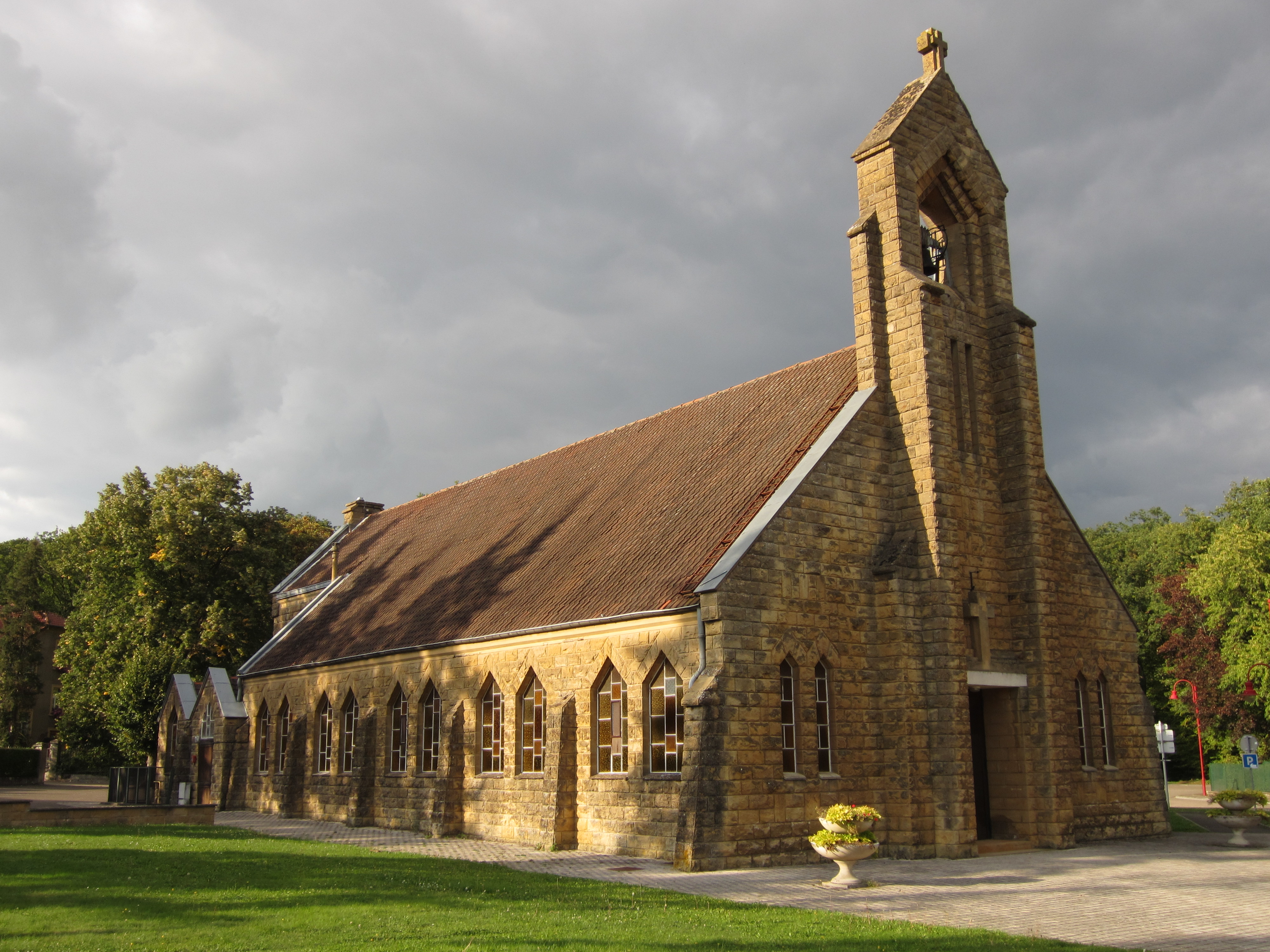 Chapelle Sainte-Jeanne d'Entrange